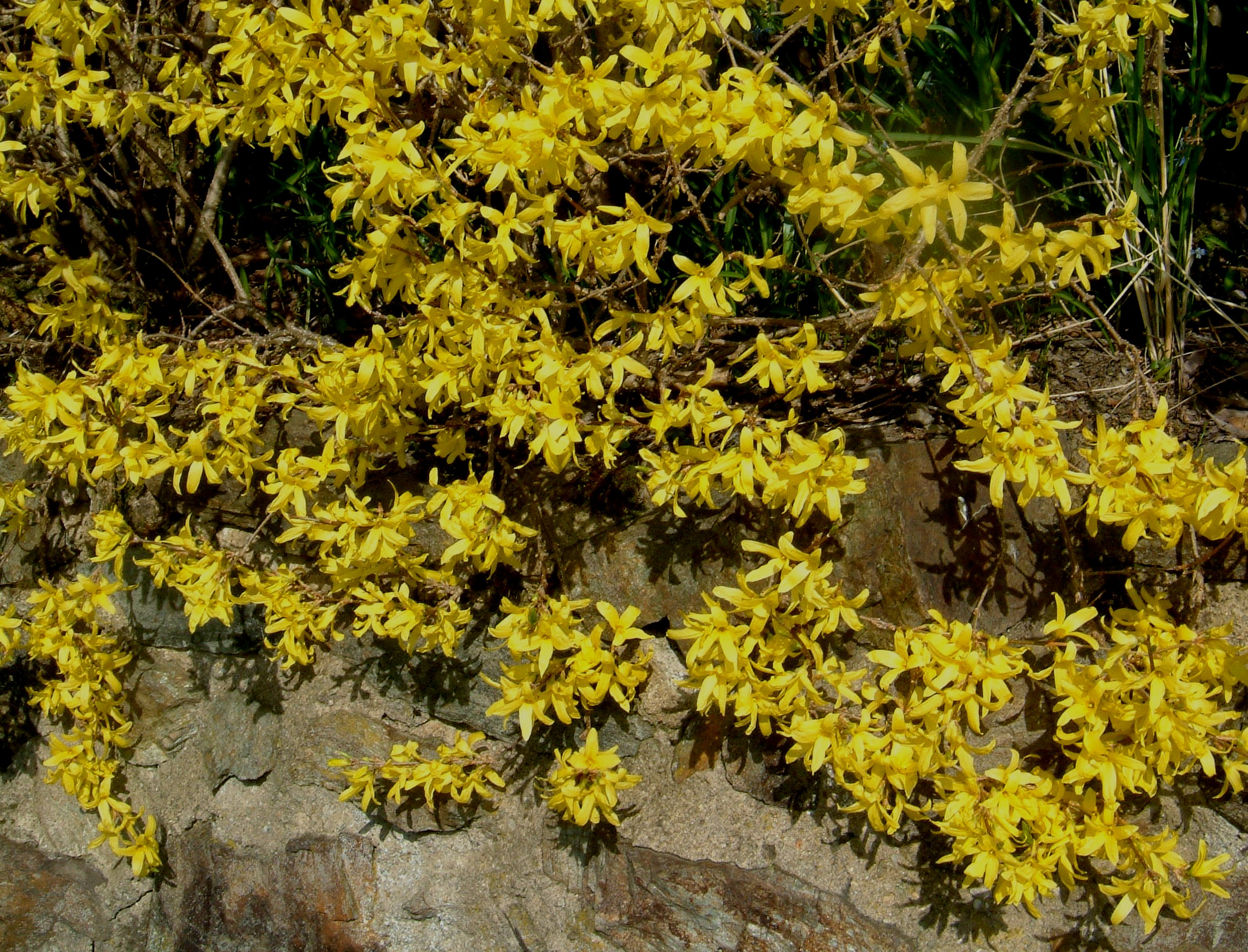 Forsythie 31 März 2007 Sachsen